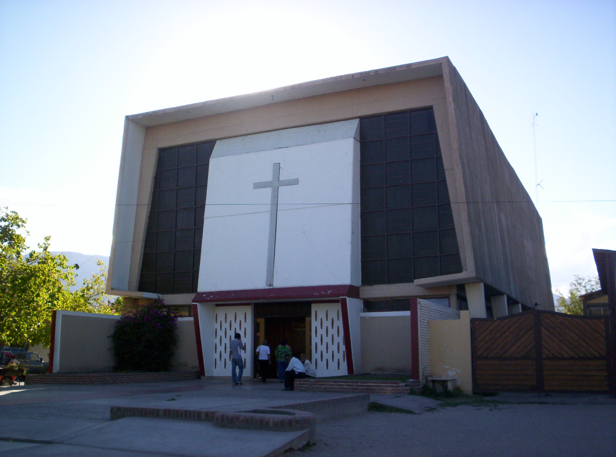 Fotografía de la iglesia parroquial de Santa Bárbara, Villa Aberastain, departamento Pocito, San Juan, Argentina